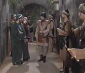 wamadat08